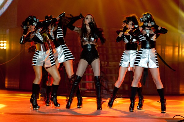 Анна Плетнёва на Концерте в Крокус Сити Холле исполняет песню Стерео